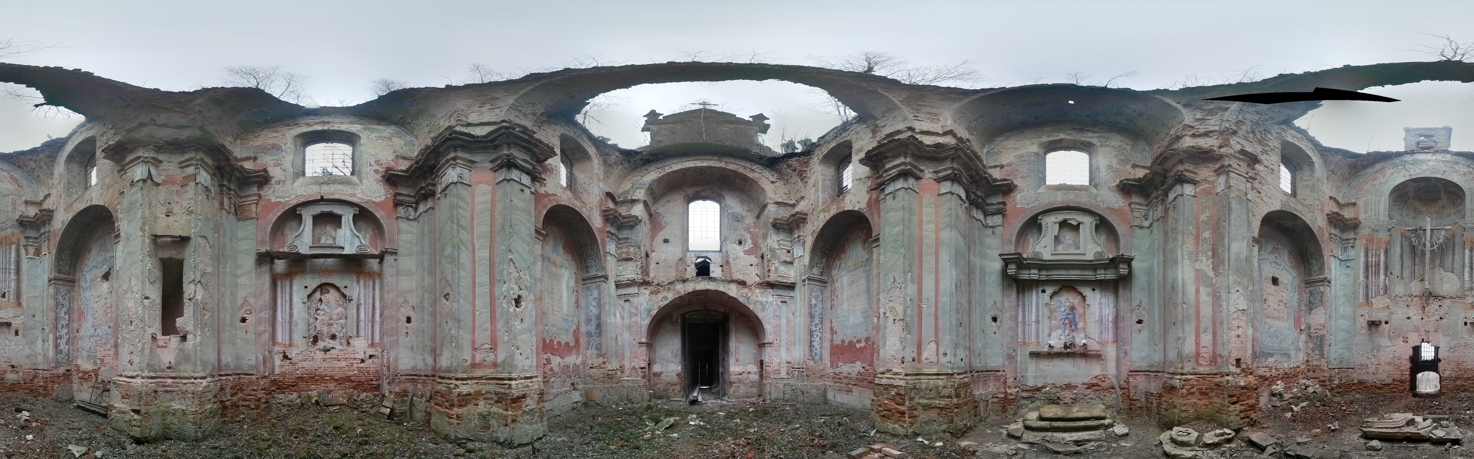 Костел Всіх Святих (мур.), с.Годовиця